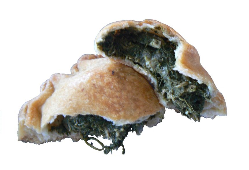 Rubiol d'espinacs menorquí, partit per la meitat per a poder veure el farcit. Els rubiols i les formatjades són tradicionals a les festes majors de tots els municipis de Menorca.